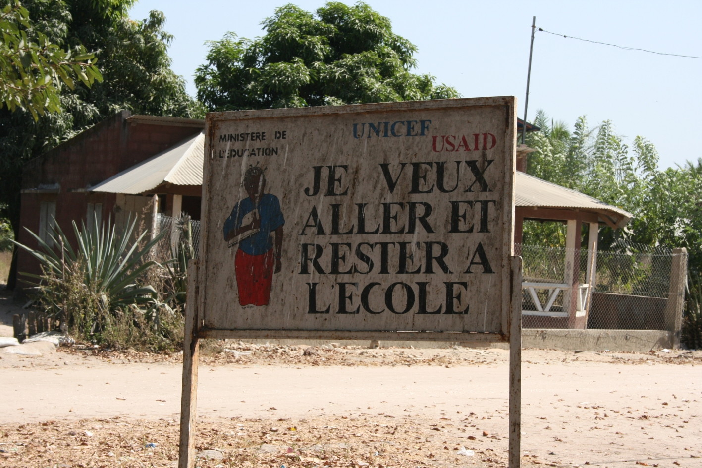 Panneau de l’UNICEF pour la sensibilisation contre l’abandon scolaire à Diembéring en Casamance (Sénégal)